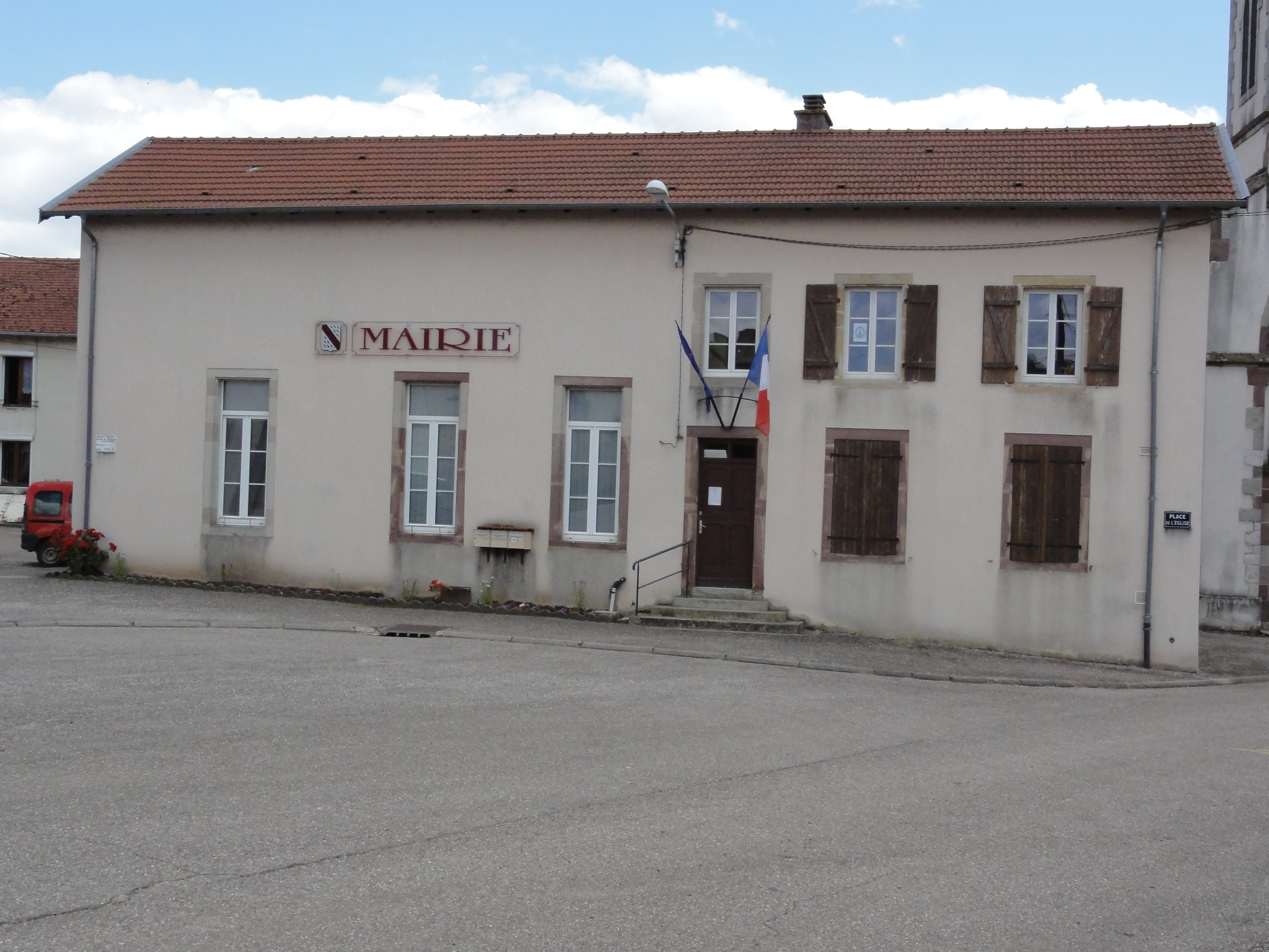 Valhey (M-et-M) mairie